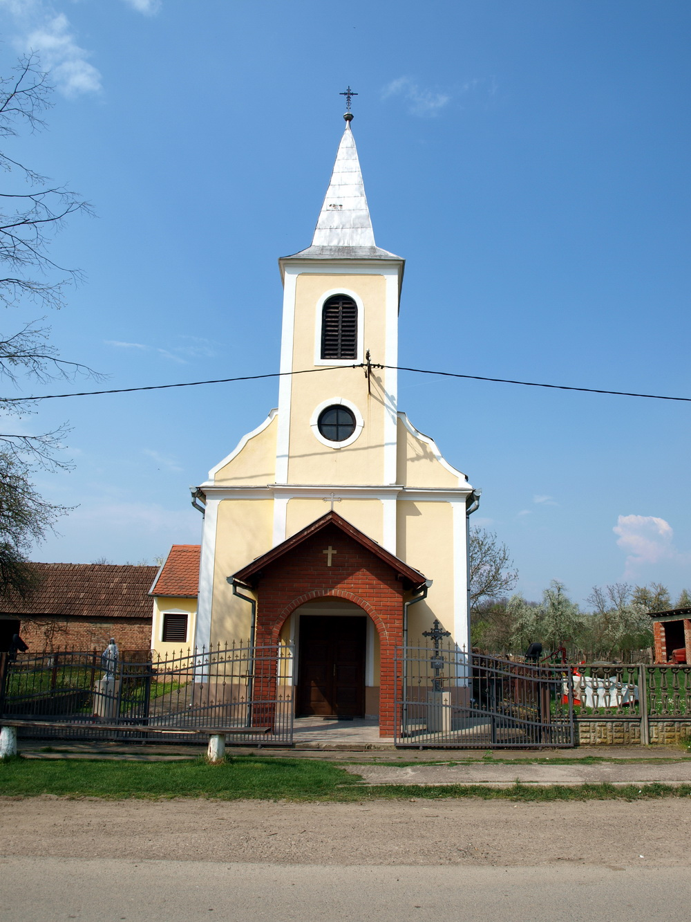 Crkva u selu Prnjavor, Brodsko-posavska županija.